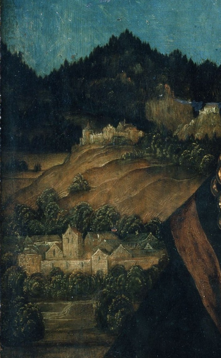 Bildausschnitt vom Bildnis des Grafen Johann II. zu Montfort und Rothenfels 1523